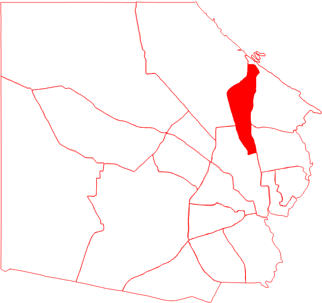 Ubicación de la parroquia Juana de Ávila en el municipio Maracaibo, estado Zulia, Venezuela